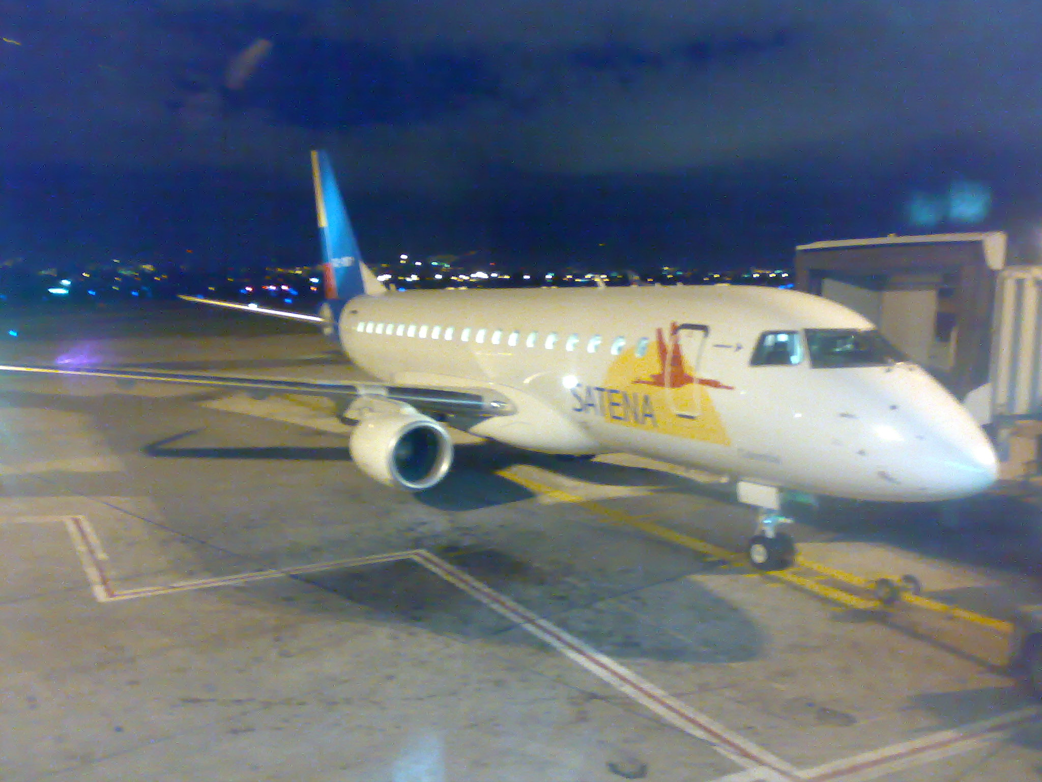 Satena Embraer 170 at El Dorado International Airport.